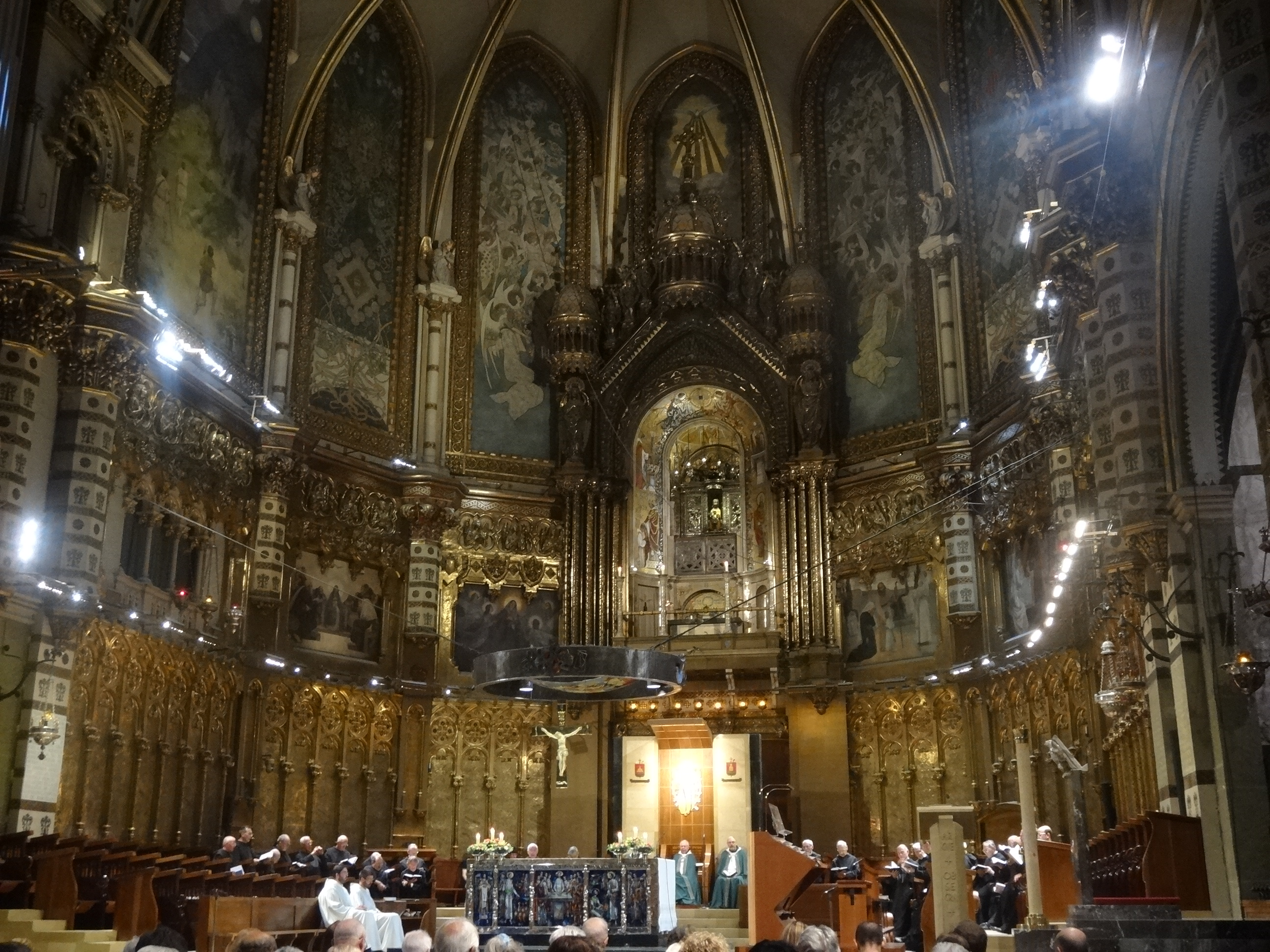 Vespres al Monestir de Montserrat